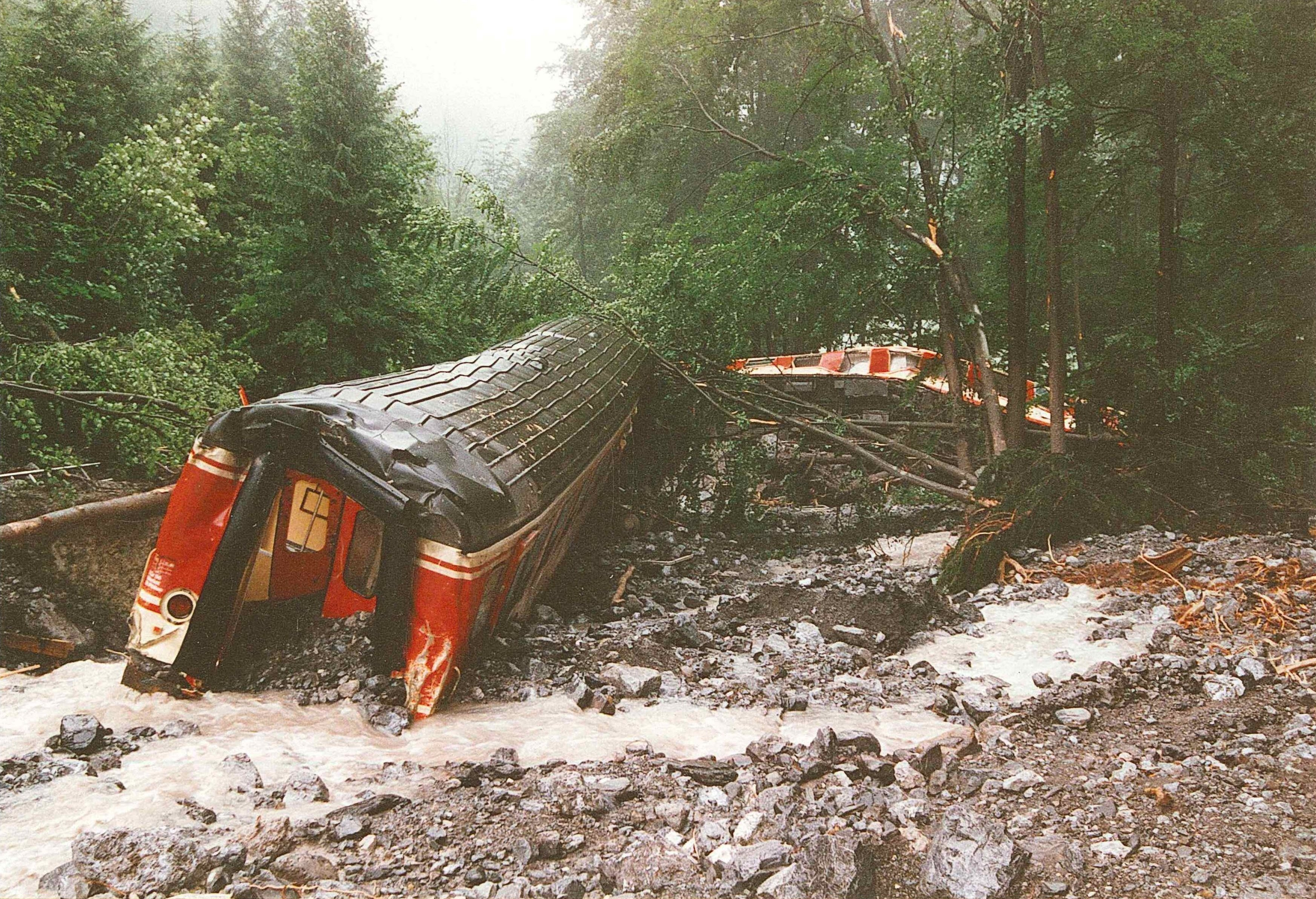 Absturzstelle im Masonbach beim Zugunglück von Braz 1995